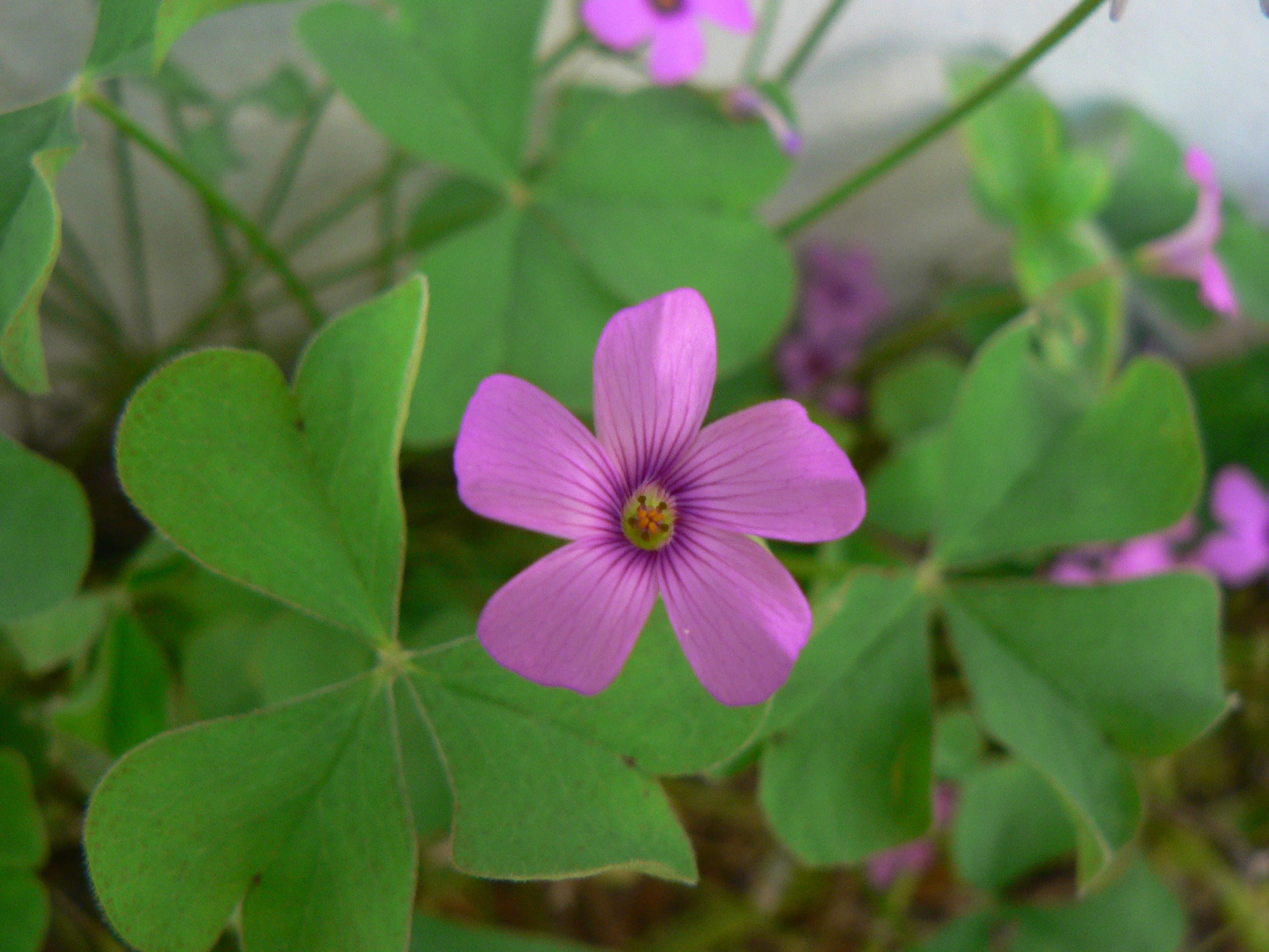 Oxalis חמציץ